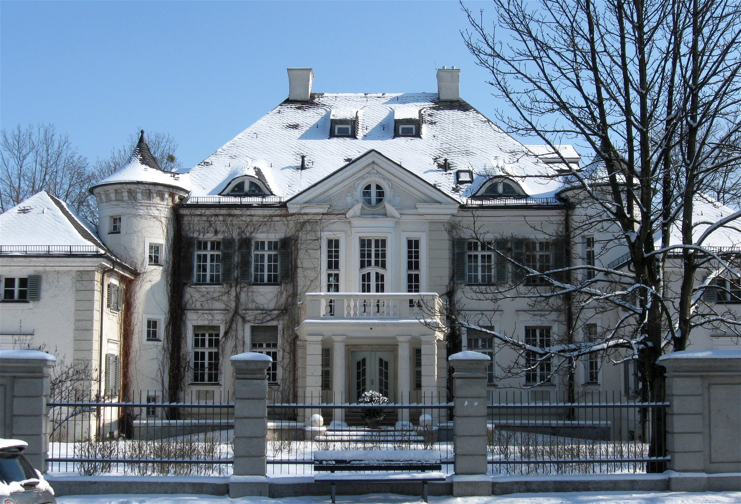 Waisenhausstraße 4; Schlossartige Villa, neubarock, um 1925; in großem Garten mit zwei pfeilerflankierten Gartentoren; München-Neuhausen; heute Sitz der Bayerischen Architektenkammer; ehemals Sitz des Postpräsidenten, daher auch als „Postvilla“ oder „Präsidentenvilla“ bekannt